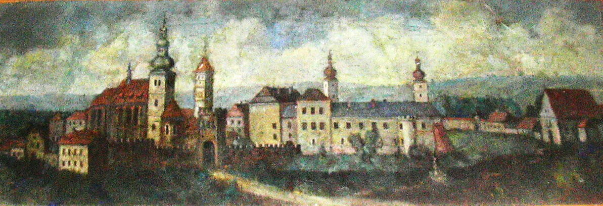 Znázornění Vyškova s Brněnskou bránou (Vyškov- Czech republic)